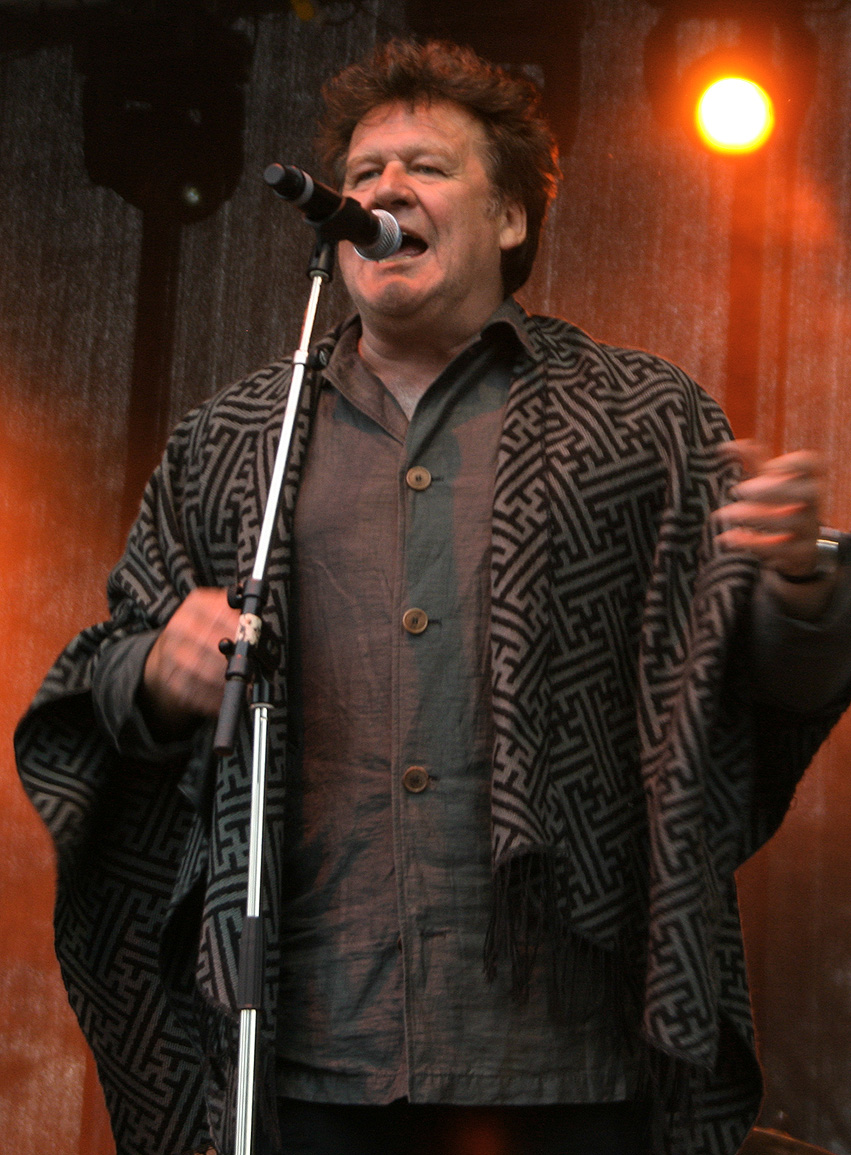 Der österreichische Sänger Wilfried bei einem Konzert zum Ersten Mai im Wiener Prater.